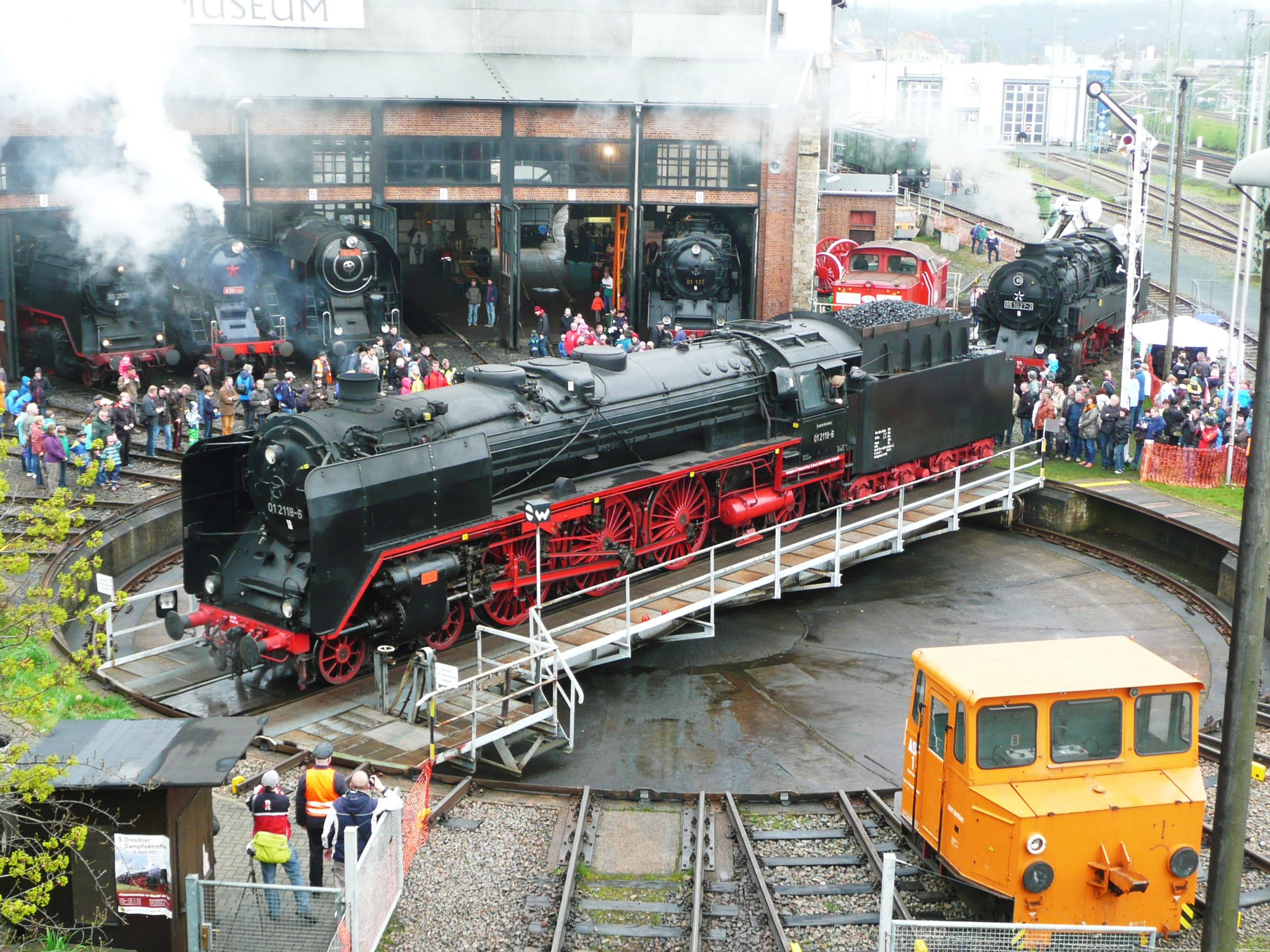 01 2118 beim Dampflokfest Dresden.